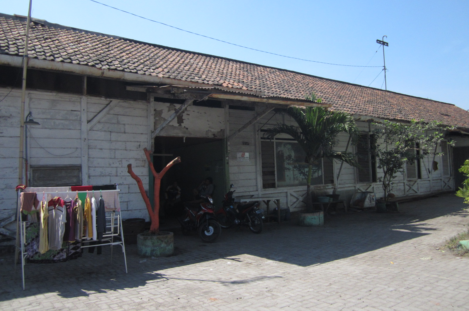 Eks (bekas) bangunan Stasiun Gresik